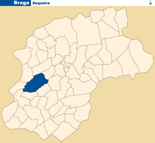 Localização de Sequeira no concelho de Braga.